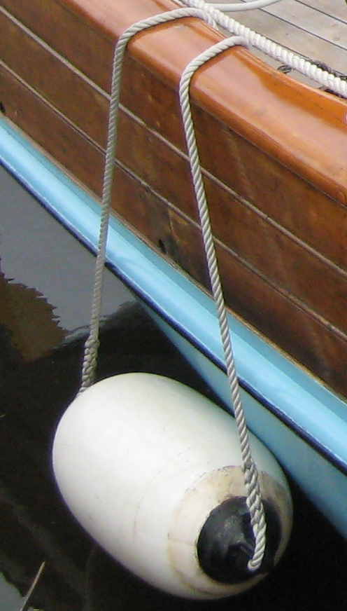 Detail der Auriga, aufgenommen auf dem dritten Störschipperfest in Itzehoe; beschnitten auf den Fender